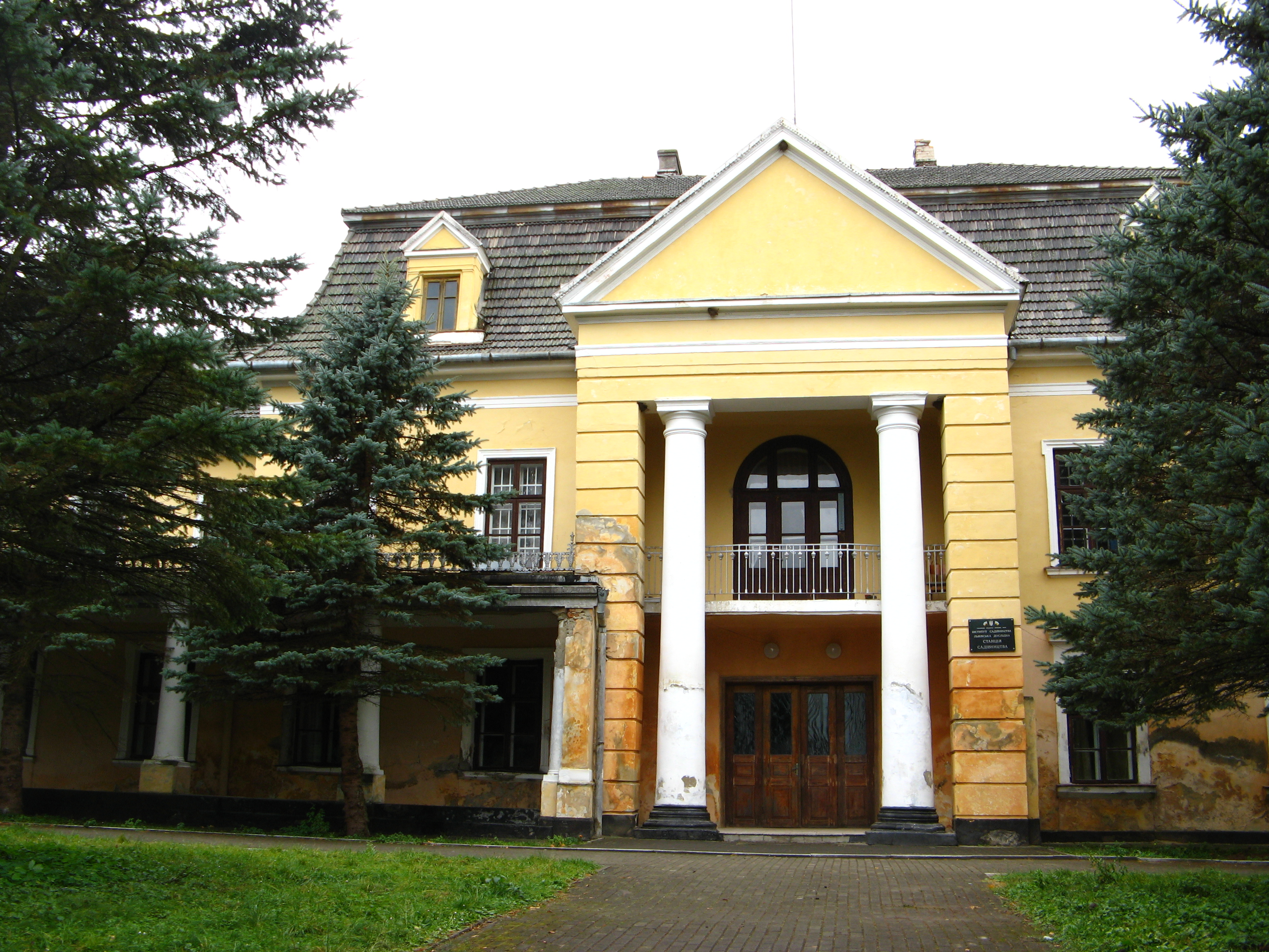 палац Дідушицьких (с. Неслухів, Львівська обл.)